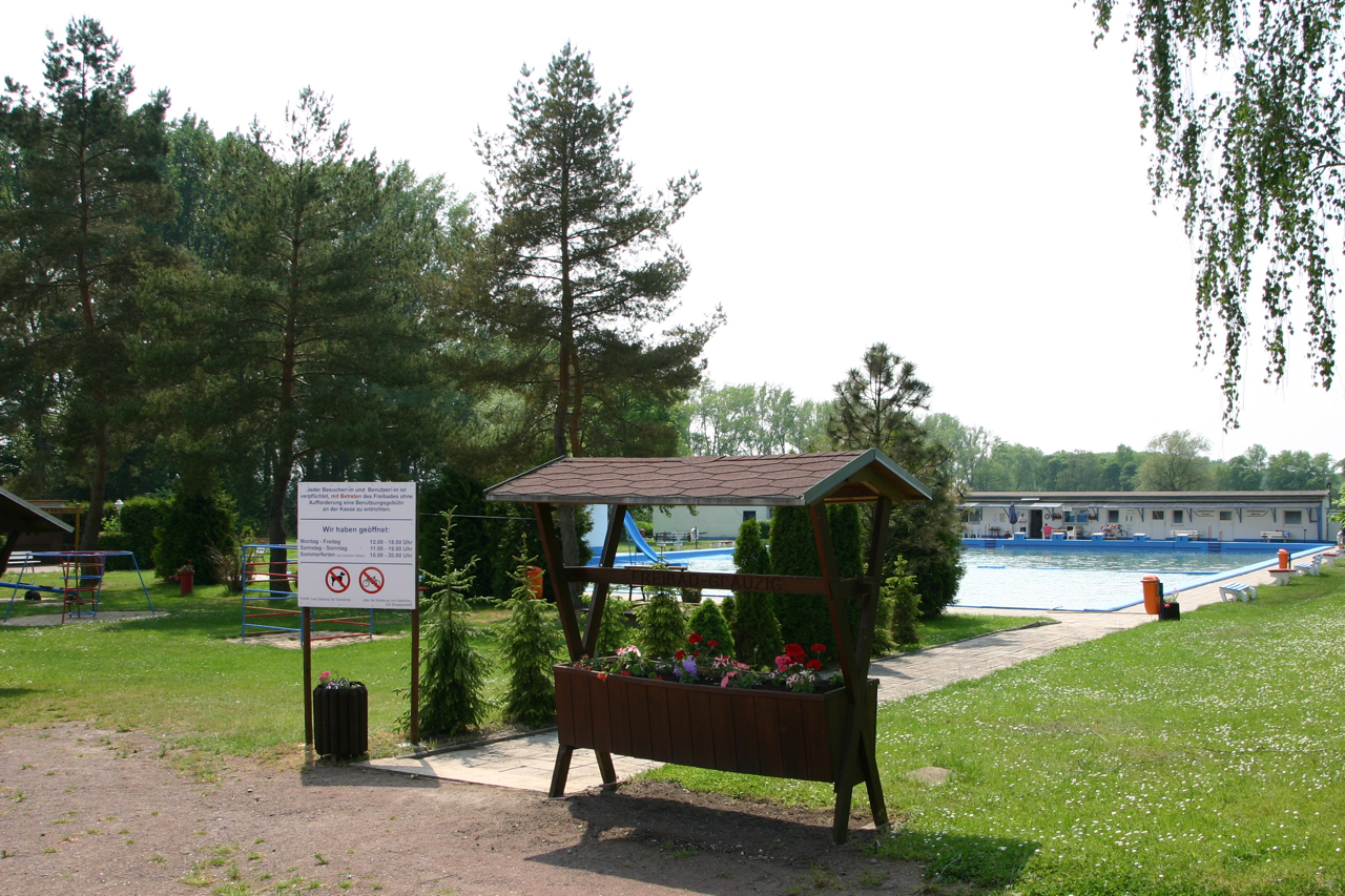 Glauzig ist ein Ortsteil der Stadt Südliches Anhalt in Sachsen-Anhalt, Deutschland.